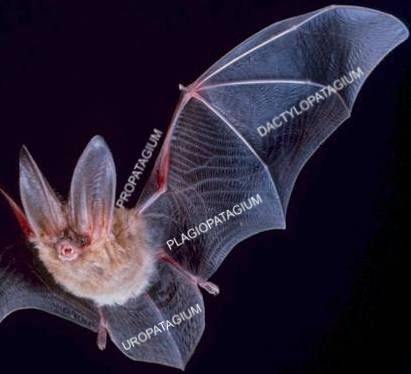 Annotations de la photo File:Big-eared-townsend-fledermaus.jpg de WK Commons